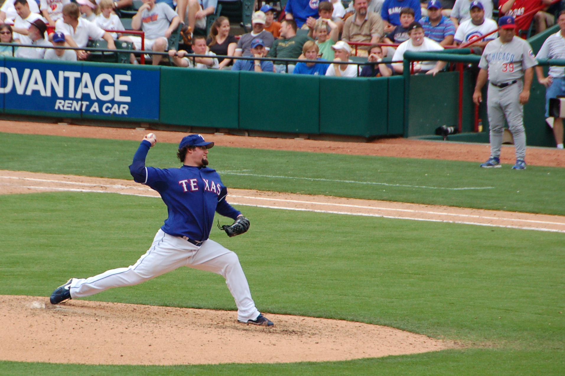 Éric Gagné